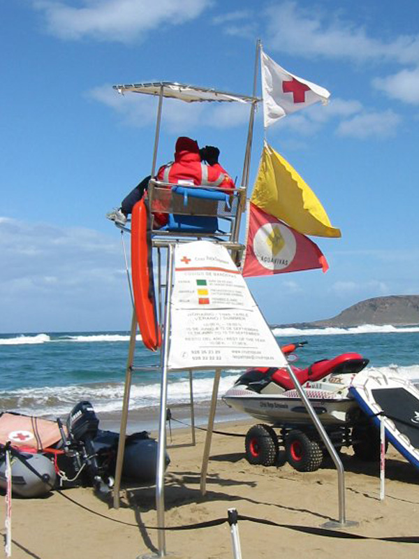 Playa de Las Canteras. Vigilancia y socorrismo. Las banderas amarilla alerta de las condiciones del baño (precaución), la roja advierte de la presencia de aguavivas (medusas) que pueden producir picaduras y escozor si se entra en contacto con ellas durante el baño. Las Palmas de Gran Canaria. Foto tomada el 28 de febrero de 2006.